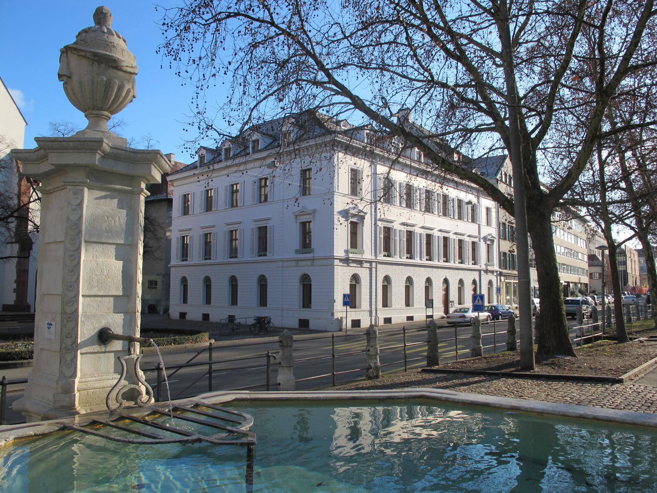 Die Musikwissenschaft an der Universität Basel ist geprägt durch die beiden Schwerpunkte der älteren und neueren/neuesten Musikgeschichte, die je mit einer Professur vertreten sind. In einem durch Lehraufträge vielseitig ergänzten Lehrangebot wird damit die Musikgeschichte in ihrer ganzen Breite abgedeckt: Von den Anfängen der schriftlichen Aufzeichnung im 9. Jahrhundert bis zur Gegenwart in ihrer Vielfalt von zeitgenössischer Kunstmusik bis zum Pop. Ergänzend zu dieser historischen Ausrichtung werden einzelne ethnomusikologische sowie systematische Lehreveranstaltungen angeboten. Das hervorragend ausgestattete Seminar verfügt über eine umfangreiche Fachbibliothek zum gesamten Bereich des Faches sowie ein europaweit einzigartiges Mikrofilmarchiv. Unser Seminar versteht sich als ein Lehr- und Forschungsseminar und verfolgt zudem das Ziel, seine Forschungsaktivitäten einer breiteren Öffentlichkeit zu vermitteln. Die Einbettung in ein dichtes Netzwerk musikbezogener Einrichtungen stützt das Profil des Musikwissenschaftlichen Seminars breit ab: So ist für die neuere/neueste Musikgeschichte die Nähe zur Paul Sacher Stiftung, für alle Fragen einer historisch informierten Aufführungspraxis die benachbarte Schola Cantorum Basiliensis von zentraler Bedeutung. Zusammen mit dem reichen Konzert- und Theaterleben der Musikstadt Basel sind dies ideale Voraussetzungen für ein vielseitiges, umfassendes Studium und für ein fruchtbares Zusammenwirken von Forschung, Lehre sowie künstlerischer und wissenschaftlicher Berufspraxis.